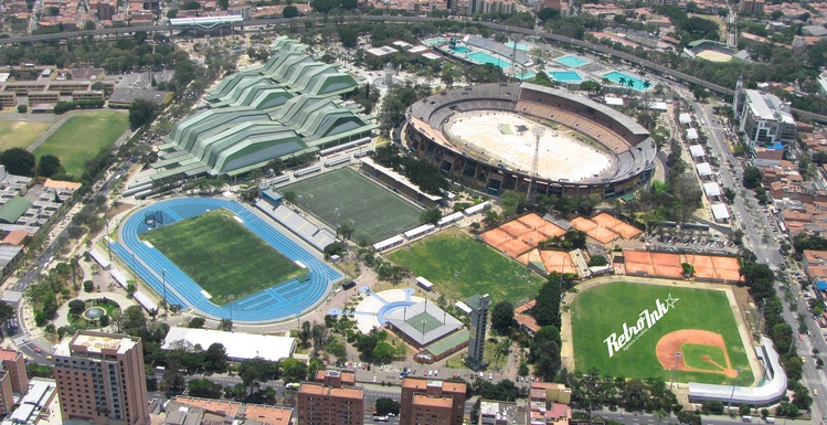 Unidad deportiva Atanacio Girardot - Cutro días antes de la inauguración de los Juegos Suramericanos en Medellín 2010 - Antioquia - Colombia